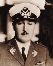 Arturo Merino Benitez, primer comandante en jefe de la Fuerza Aérea de Chile.